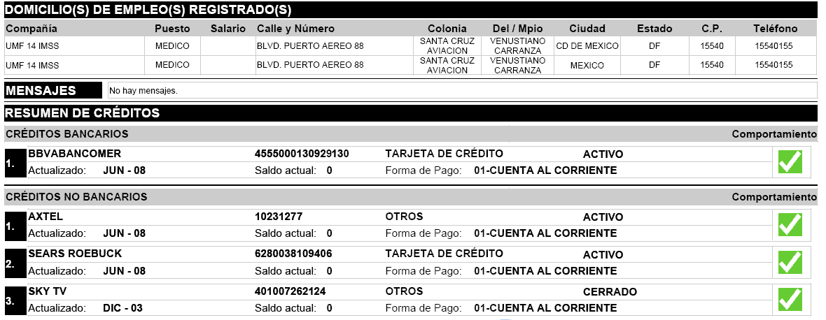 Vista del reporte especial de Buró de crédito.